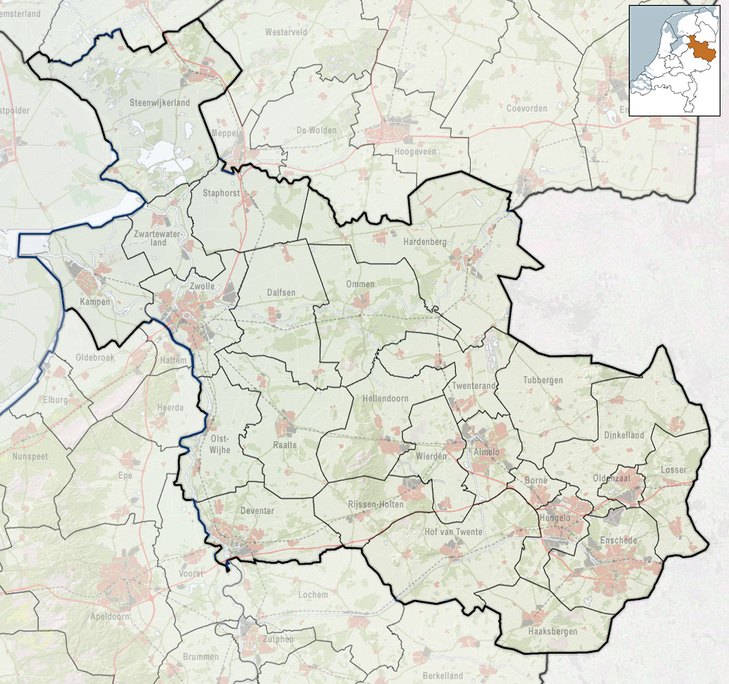 Referentiekaart van Provincie Overijssel, met indeling van gemeenten (2010) en impressie van het landschap. Door Jan-Willem van Aalst, samengesteld uit publiek beschikbare geo-data: Referentie-ondergrond (kustlijn, steden, wegen) gerasterd uit de OpenStreet Map OSM. ( Inhoud is beschikbaar onder de Creative Commons Attribution-ShareAlike 3.0 license. Referentie-ondergrond op water bewerkt vanuit Gebruik is vrij met bronvermelding NLR en ESA. Vectorgrenzen van gemeenten en regio's vrij ter beschikking gesteld met dank aan cartografen van brandweerregio's Hollands-Midden en IJsselland; gerasterd in Photoshop. Hoogte-aanduidingen (reliëf) gerasterd uit de AHN Viewer ( gebruik is vrij met bronvermelding (c) AHN, Overige kenmerken op de kaart: eigen tekenwerk van Jan-Willem van Aalst, op basis van gerasterde gemeentegrenzen.